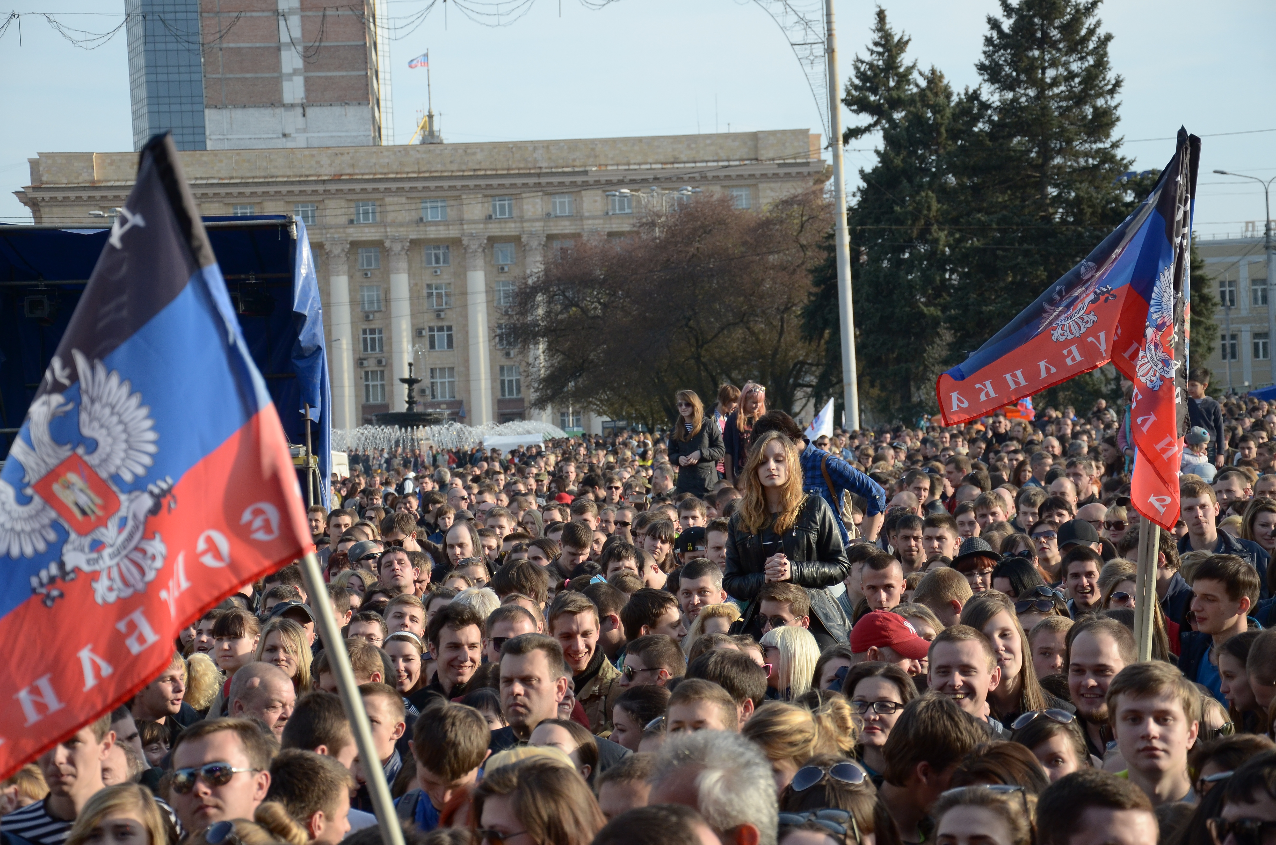 День солидарности молодёжи в Донецке